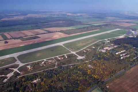 Sármellék, Hungary, aerialphotography